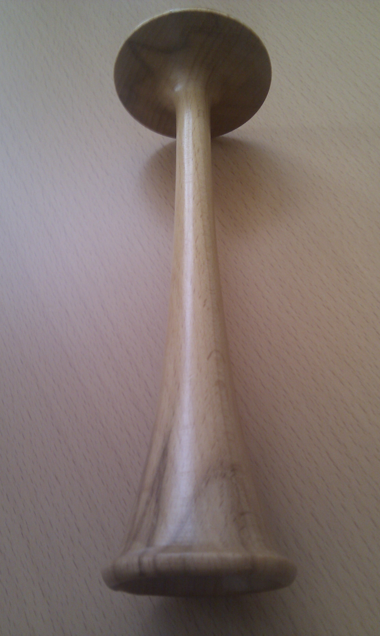 Foto eines Pinardrohres